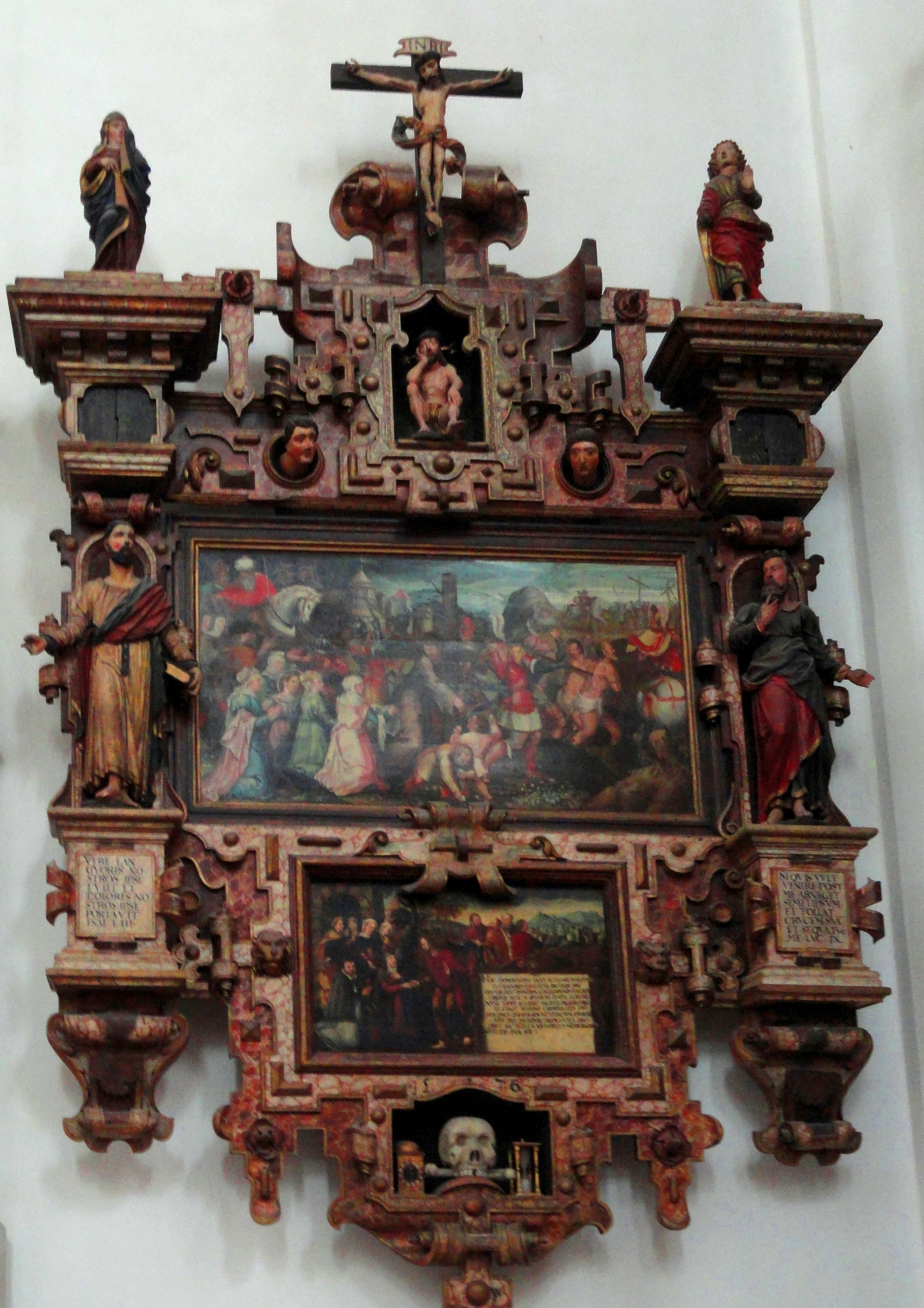 Epitaph des Philipp Dobereiner in der Münchener Frauenkirche